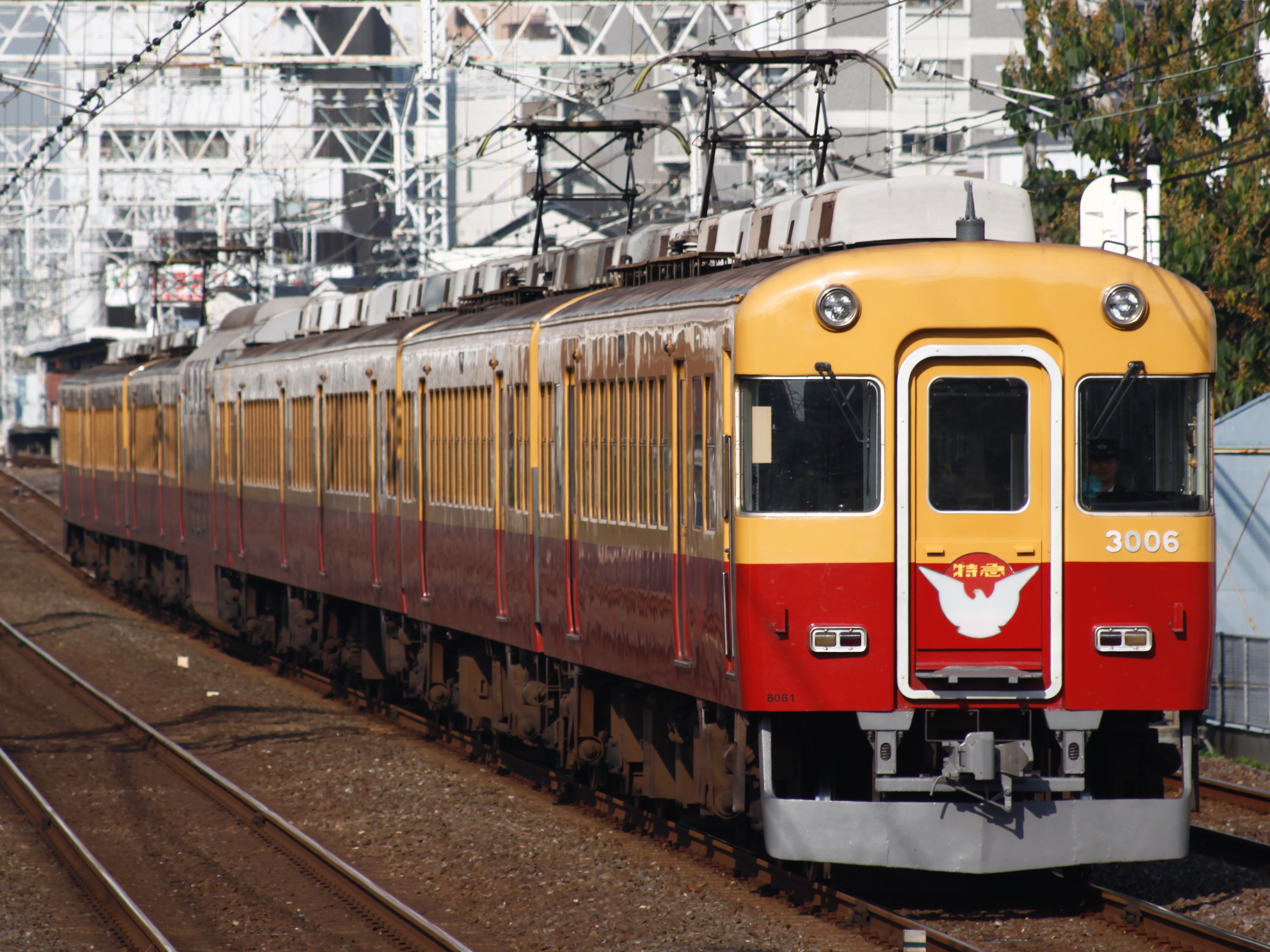 京阪8030系 3000系クラシックタイプ